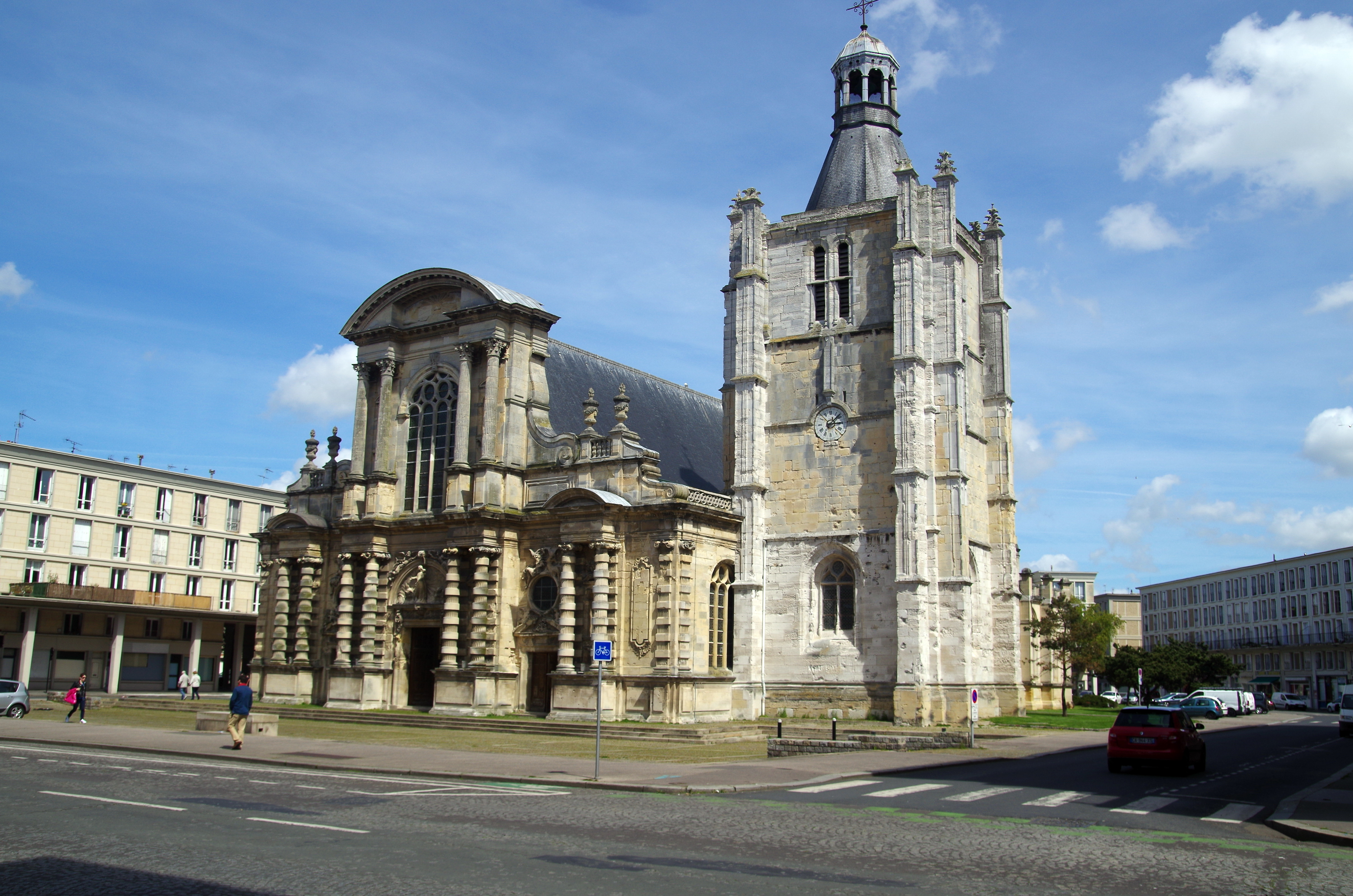 Kathedrale in Le Havre